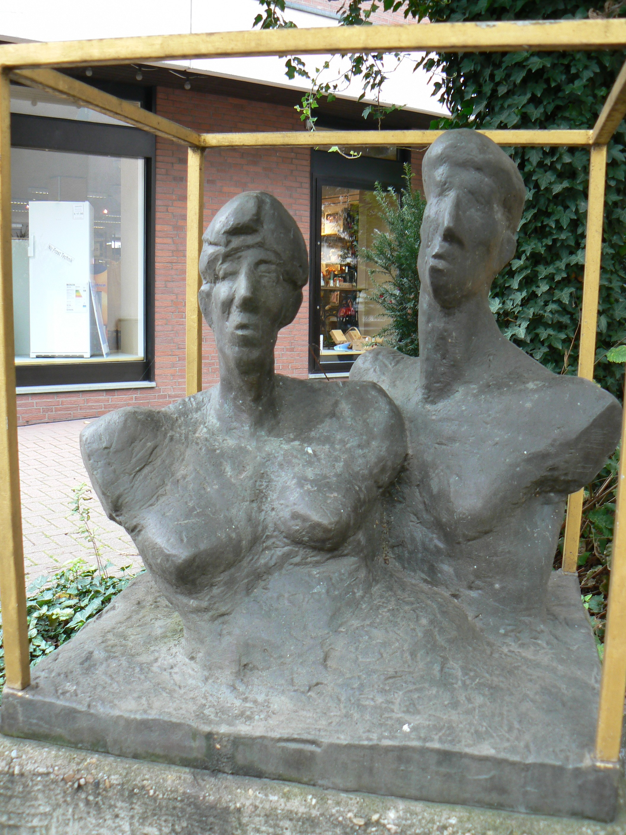 Sculpture König u. Königin 1986 by Hans J. Müller in Damme/Germany